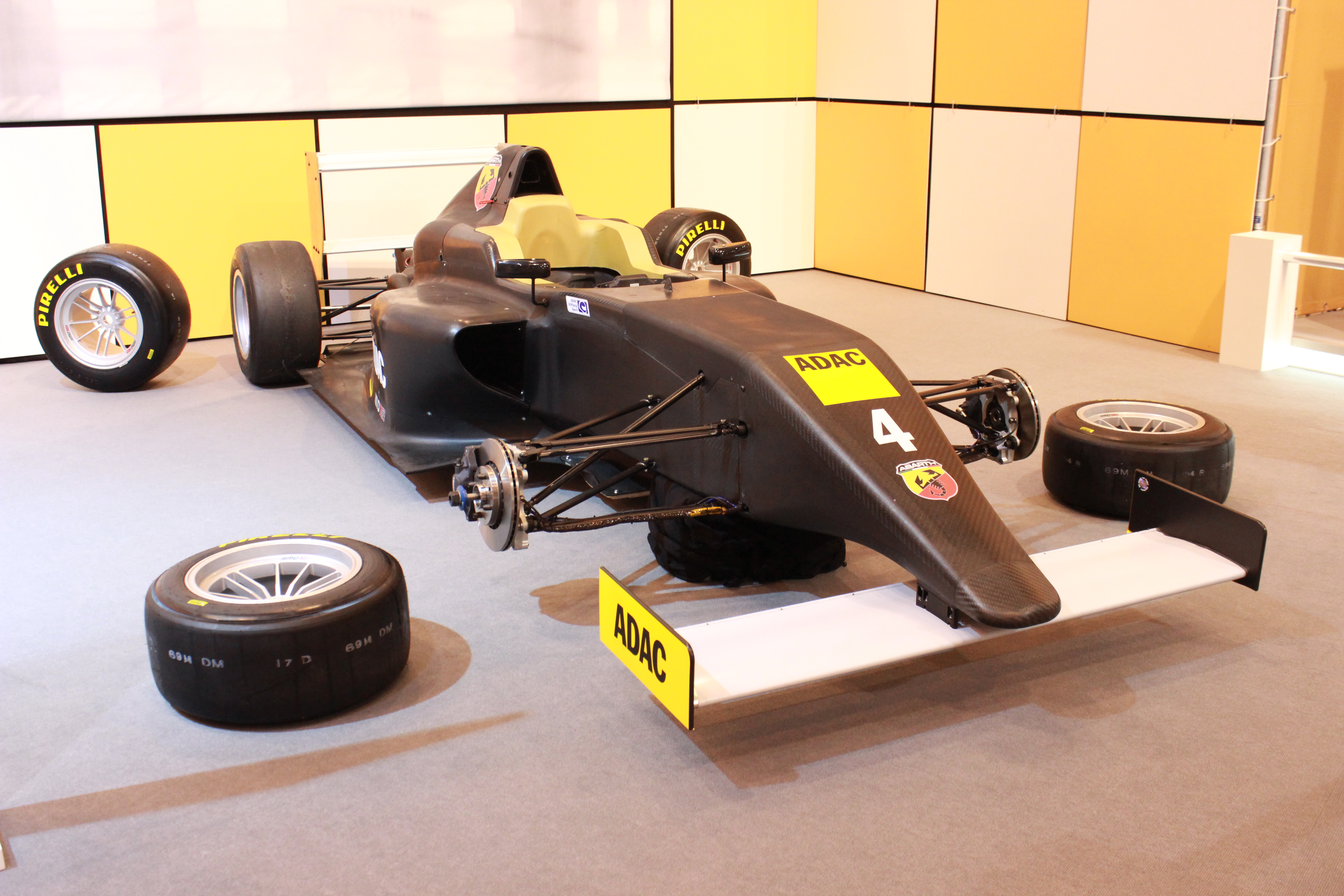 Formel 4 Fahrzeug bei der Präsentation der ADAC Formel 4 auf der Essen Motor Show